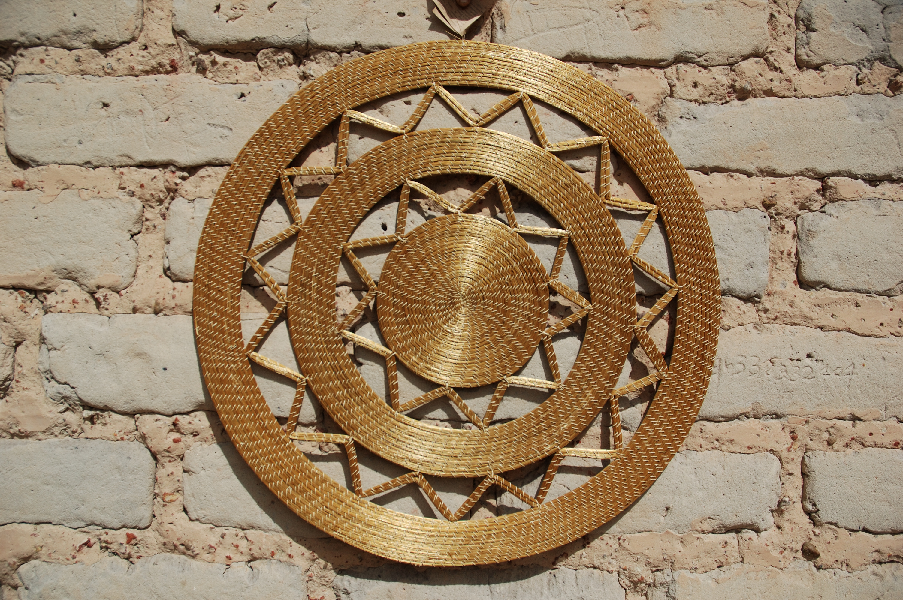 Mandala de Capim Dourado, povoado de Mumbuca